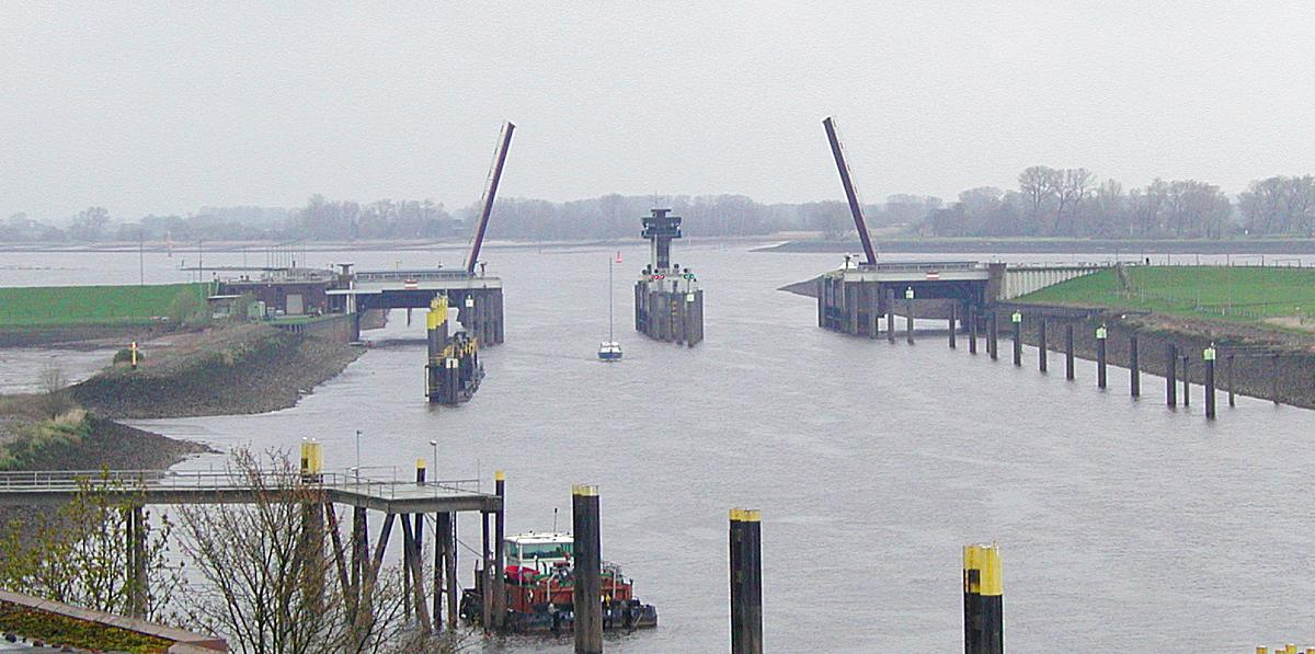 Das Huntesperrwerk bei der Einmündung der Hunte (vorne) in die Weser (hinten) bei Elsfleth.